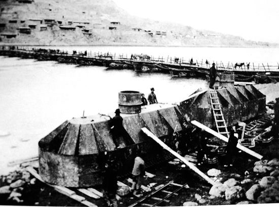 建设中的黄河铁桥